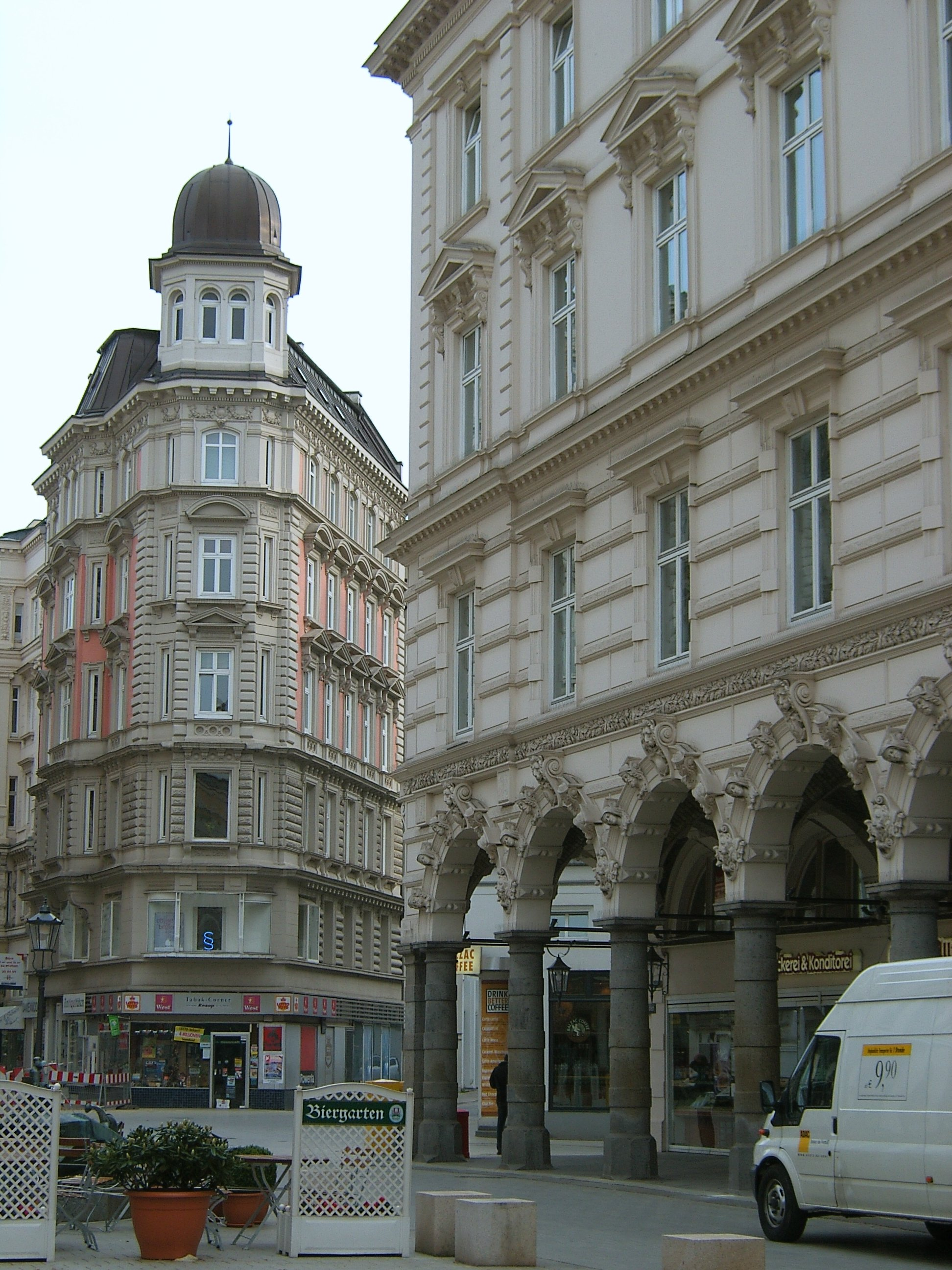 Hamburg, Innenstadt, Colonnaden